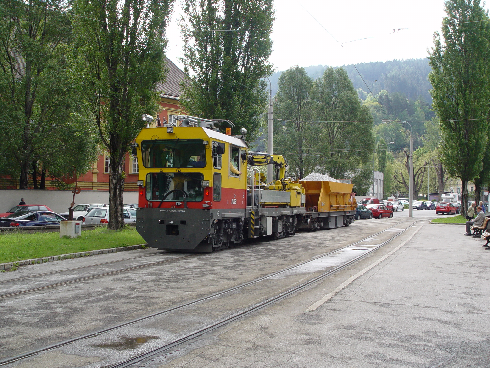 Arbeitstriebwagen 22 und Schotterlore 217 der Innsbrucker Verkehrsbetriebe